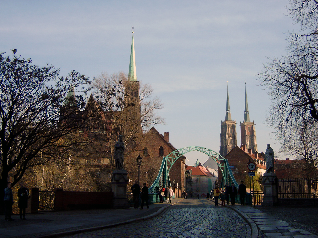 Widok na most prowadzący na Ostrów Tumski